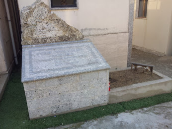 tomba di Vincenzo Asprea, entomologo ed apicoltore